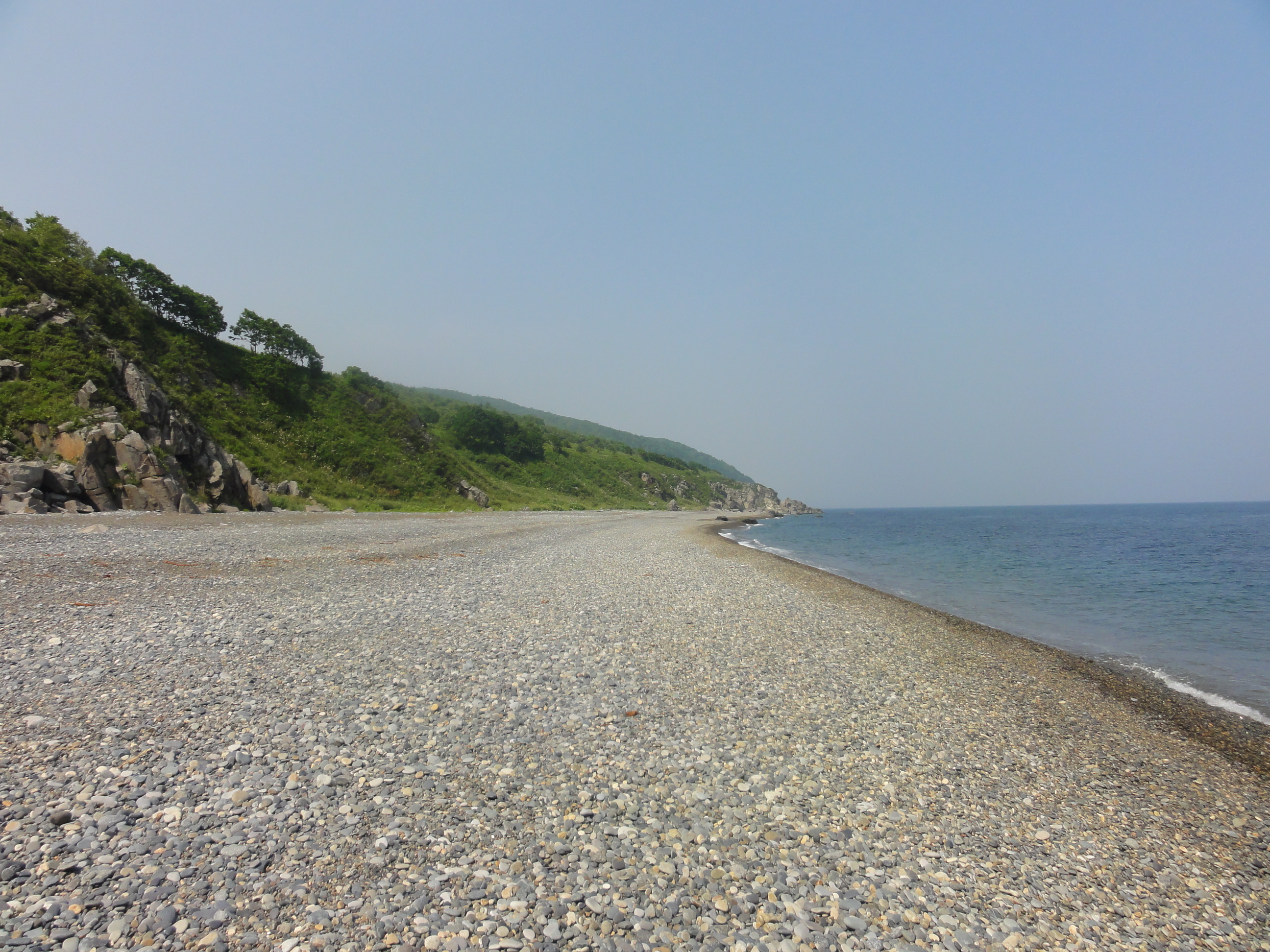 Побережье Тернейского р-на между устьями рек Кюма и Венюковка